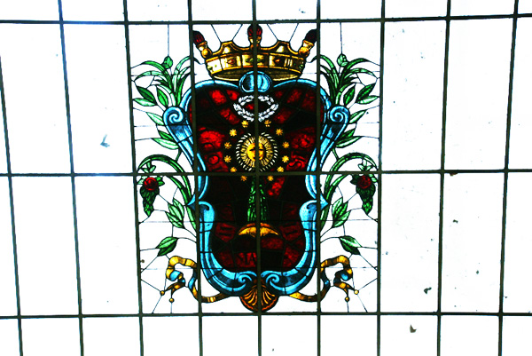 Escudo del Ilustre Colegio de Abogados en la vidriera del patio interior de su Biblioteca